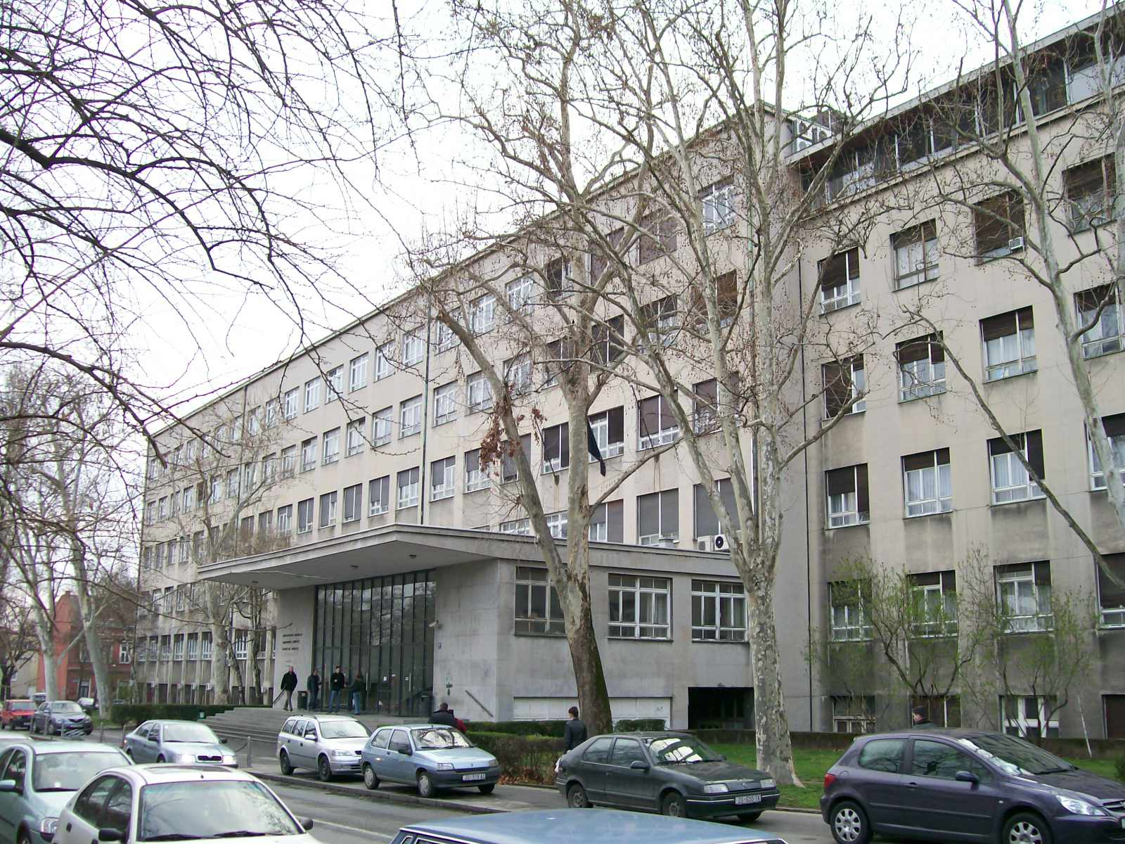 Arhitektonski fakultet u Zagrebu